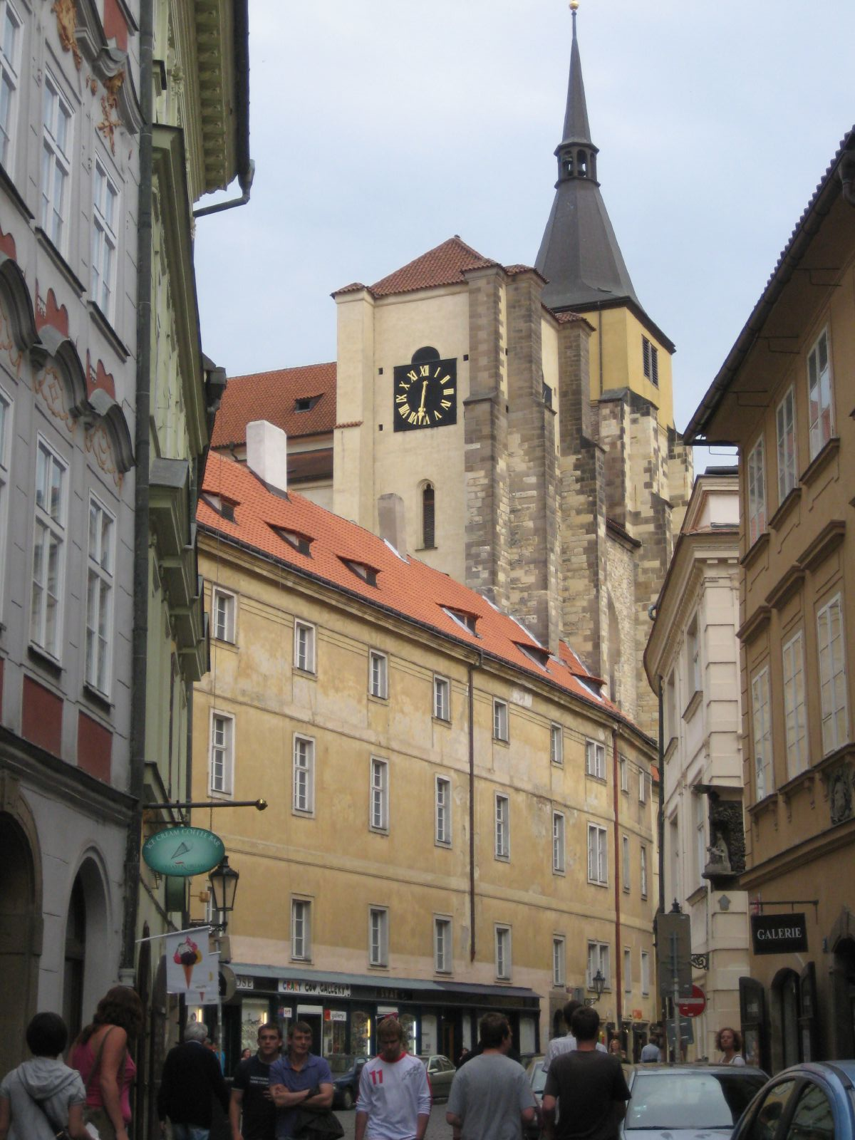 Praha, ulice Husova, Kostel svatého Jiljí